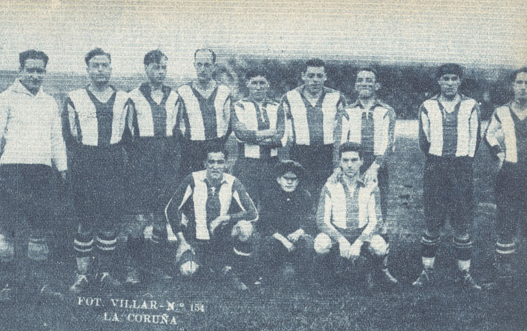 Deportvo en 1927